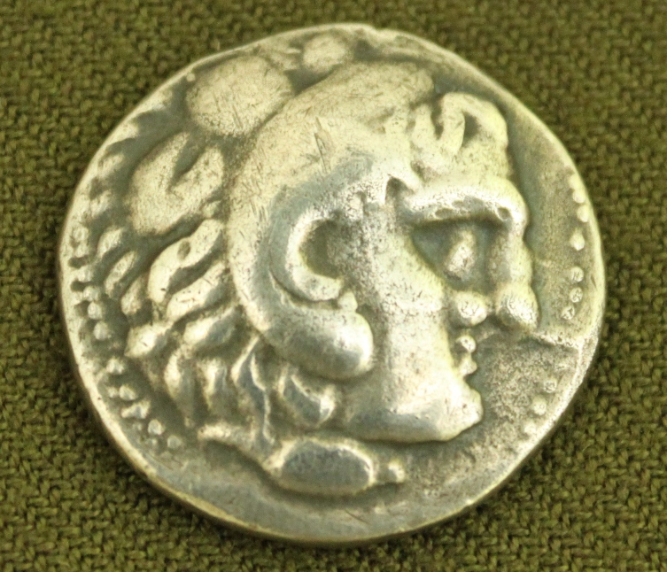 Кавказская Албания тетрадрахма (подражание) с изображением Александра Македонского.